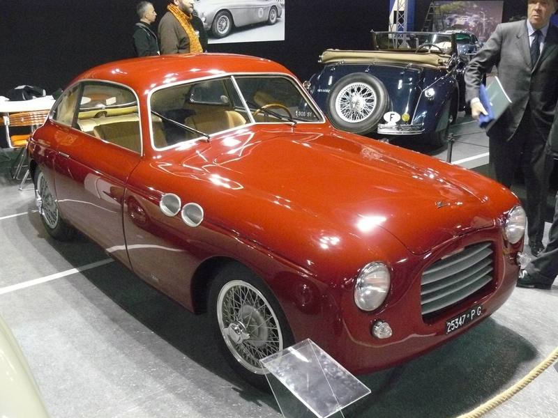 Retromobile 2012